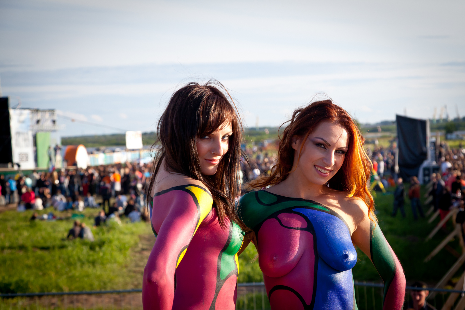 Рок-фестиваль Остров (город Архангельск). Звёзды Малой сцены. Организатор фестиваля — концертное агентство «ORLANDINA».